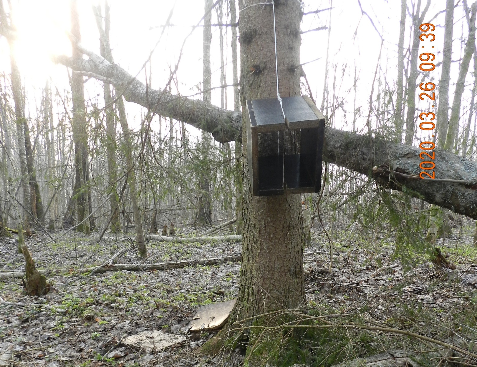 Ловушка, установленная на путике